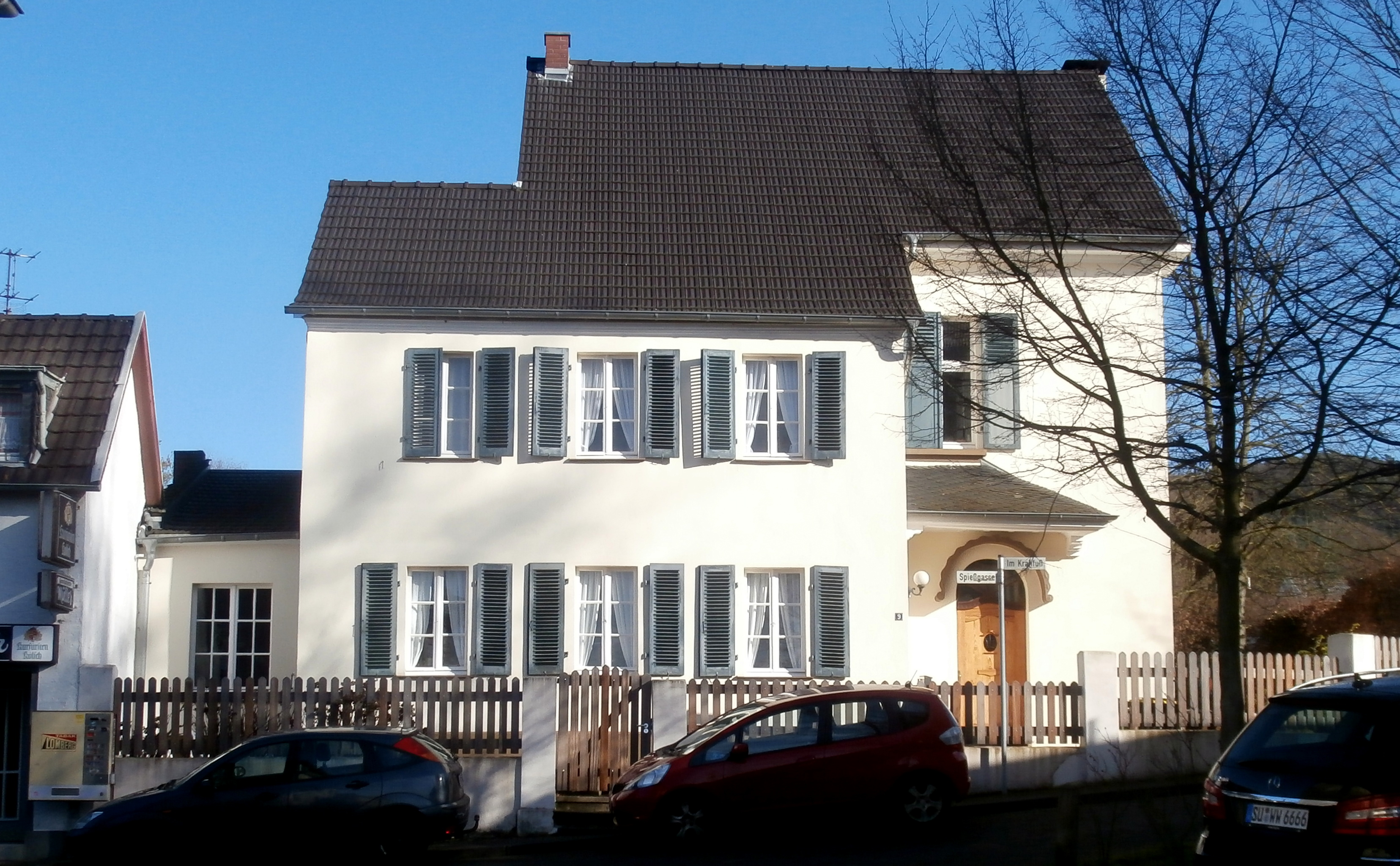 Denkmalgeschütztes Wohnhaus, Spießgasse 9, Bad Honnef